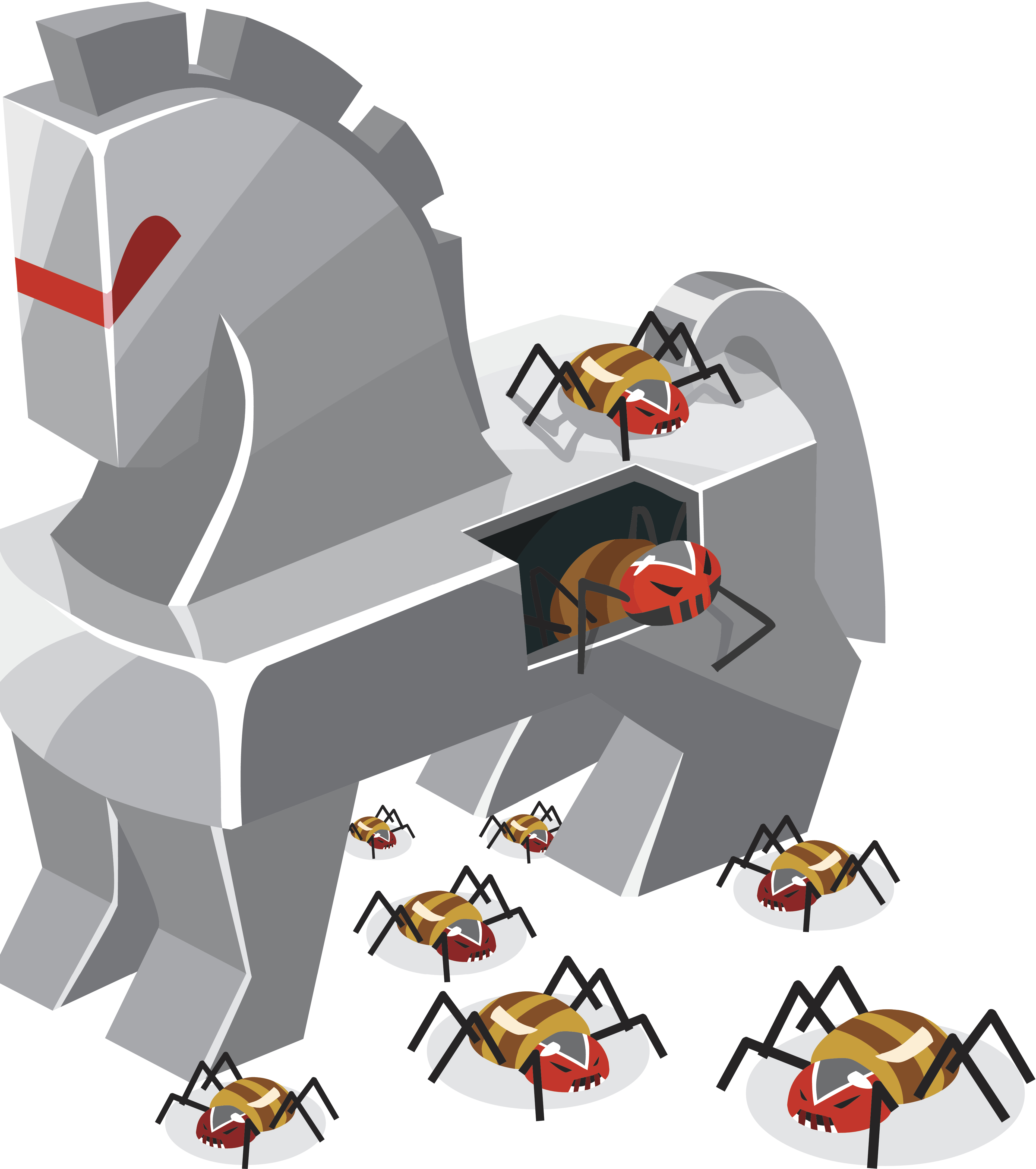 Монгол: Трожан